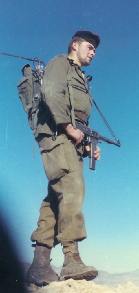 Appelé de l'armée de terre français avec pistolet-mitrailleur MAT-49 et radio américaine AN/PRC10 en 1961.